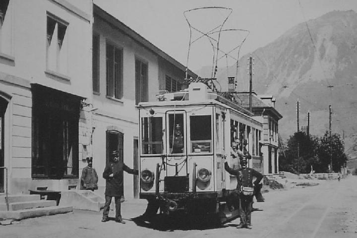 Motorwagen BCFe 2/2 der Serie 1 bis 3 der Sernftalbahn (SeTB) bei Betriebseröffnung 1905.